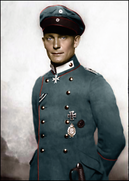 Porträt von Hermann Göring, als er Jagdflieger war.